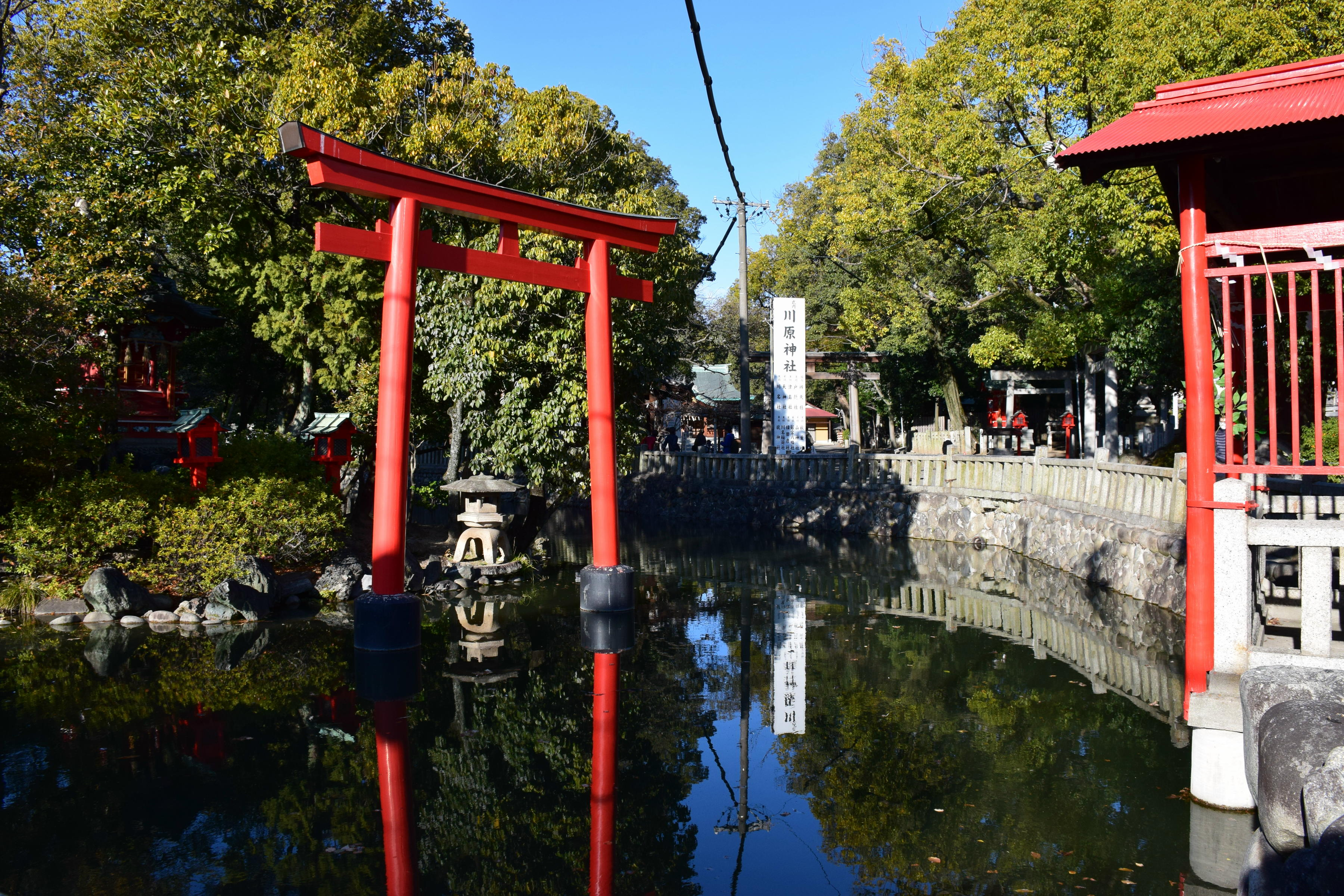 川原神社弁天池